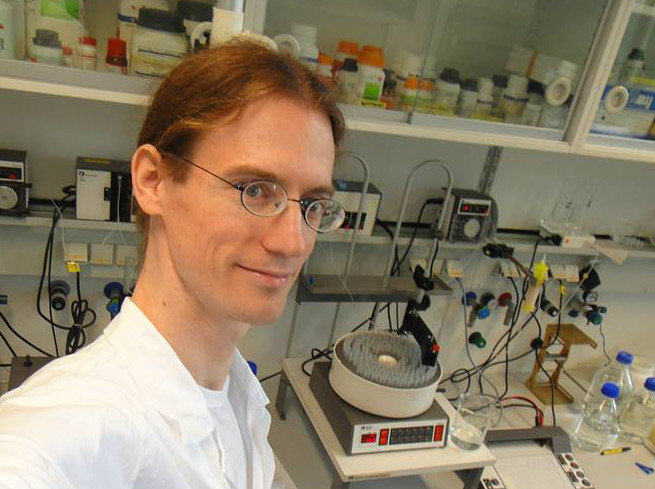 Mitbegründer und Vorsitzender der Partei für Gesundheitsforschung, Felix Werth, im Labor.